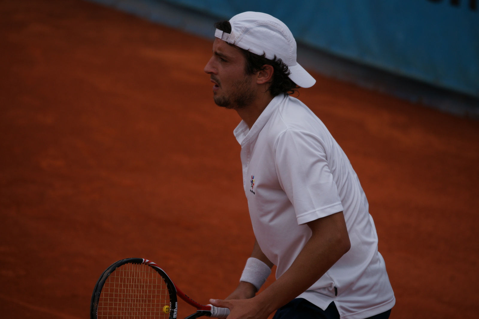 Daniele Giorgini, Open Nice 2011